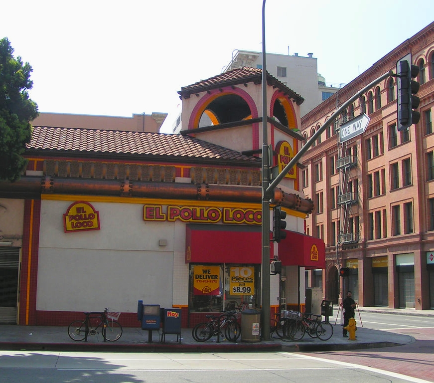 A El Pollo Loco outlet